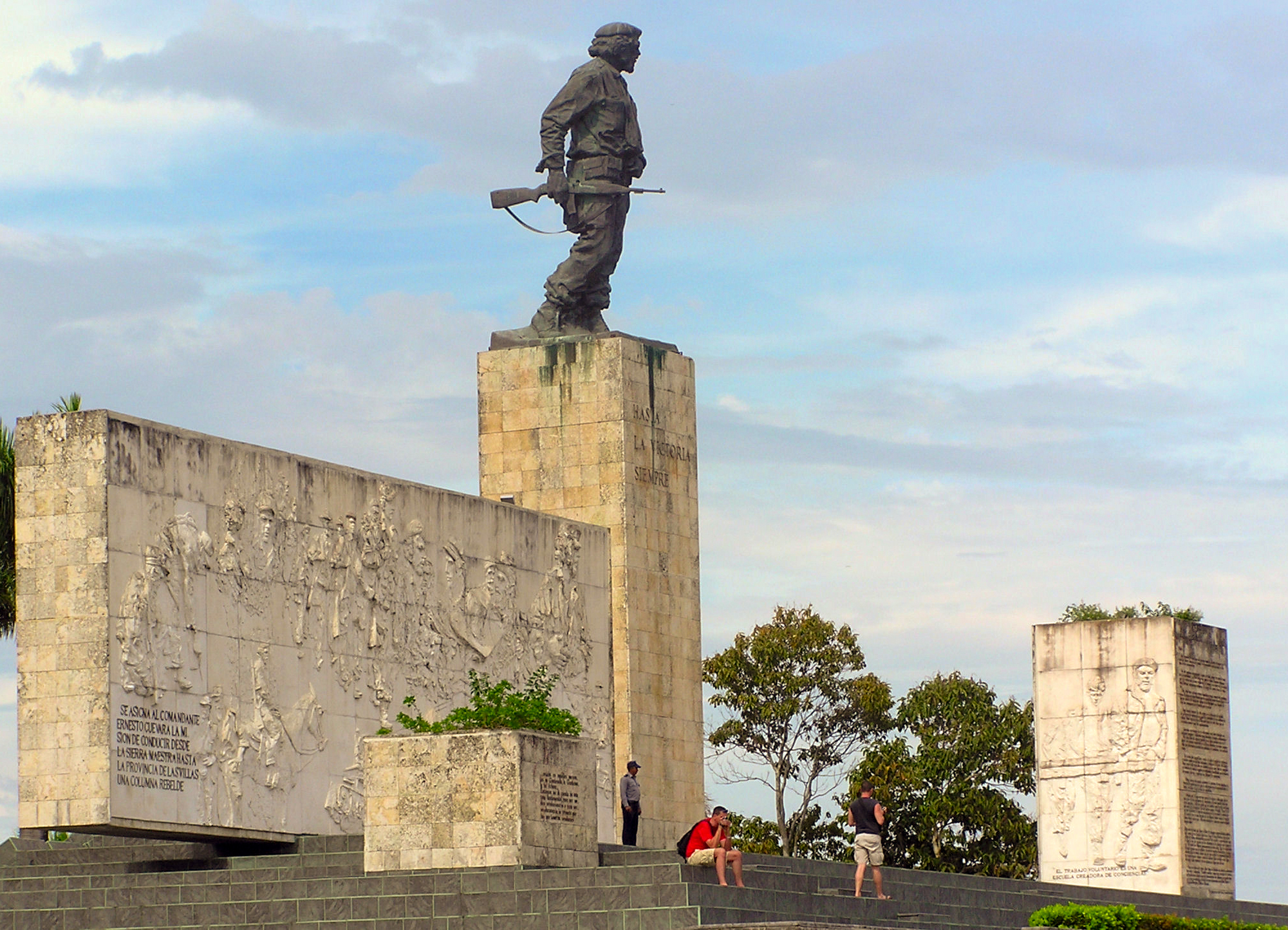 Mausolé d'Ernesto Che Guevara à Santa Clara - Cuba